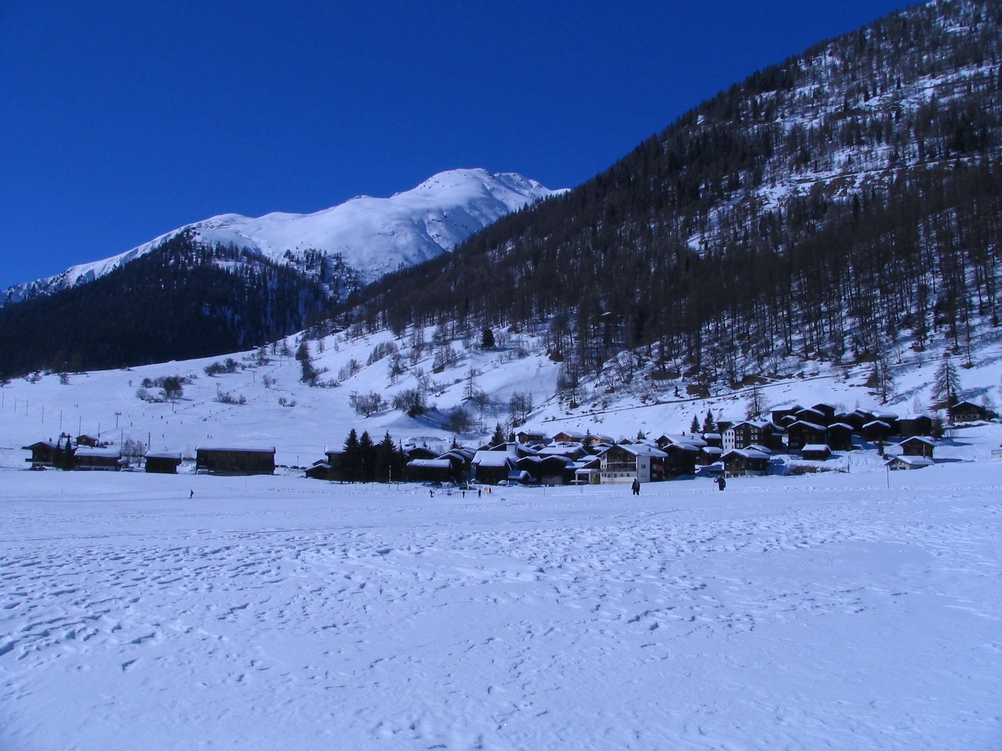 Das Dorf Geschinen (Wallis / Schweiz) im Winter